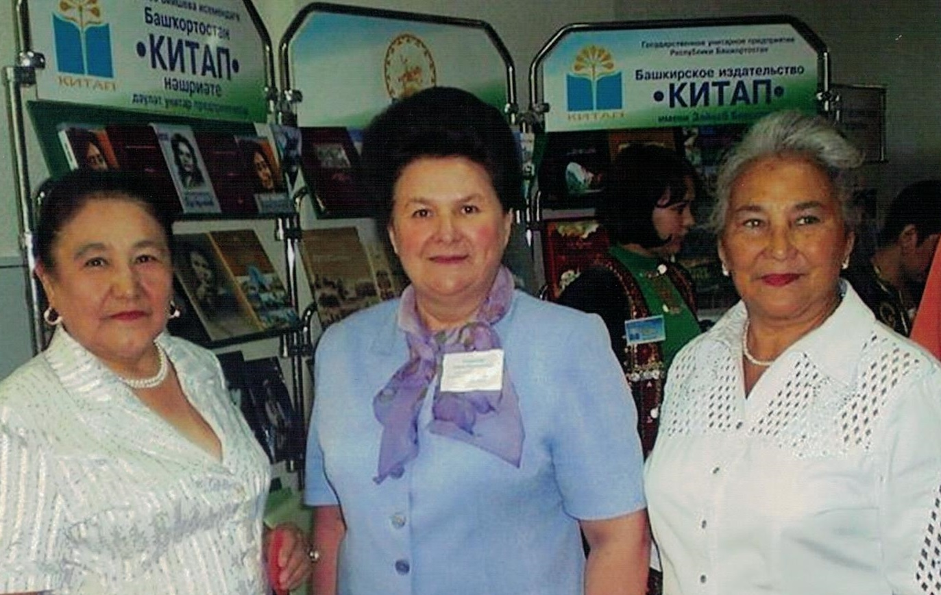 Башҡортса: Башҡорт ҡатын-ҡыҙҙары йәмғиәтенең элекке рәйестәре Фирҙәүес Хисамитдинова, Гүзәл Ситдиҡова, йәмғиәт ағзаһы шағирә Фирҙәүес Бәшәрова.2009